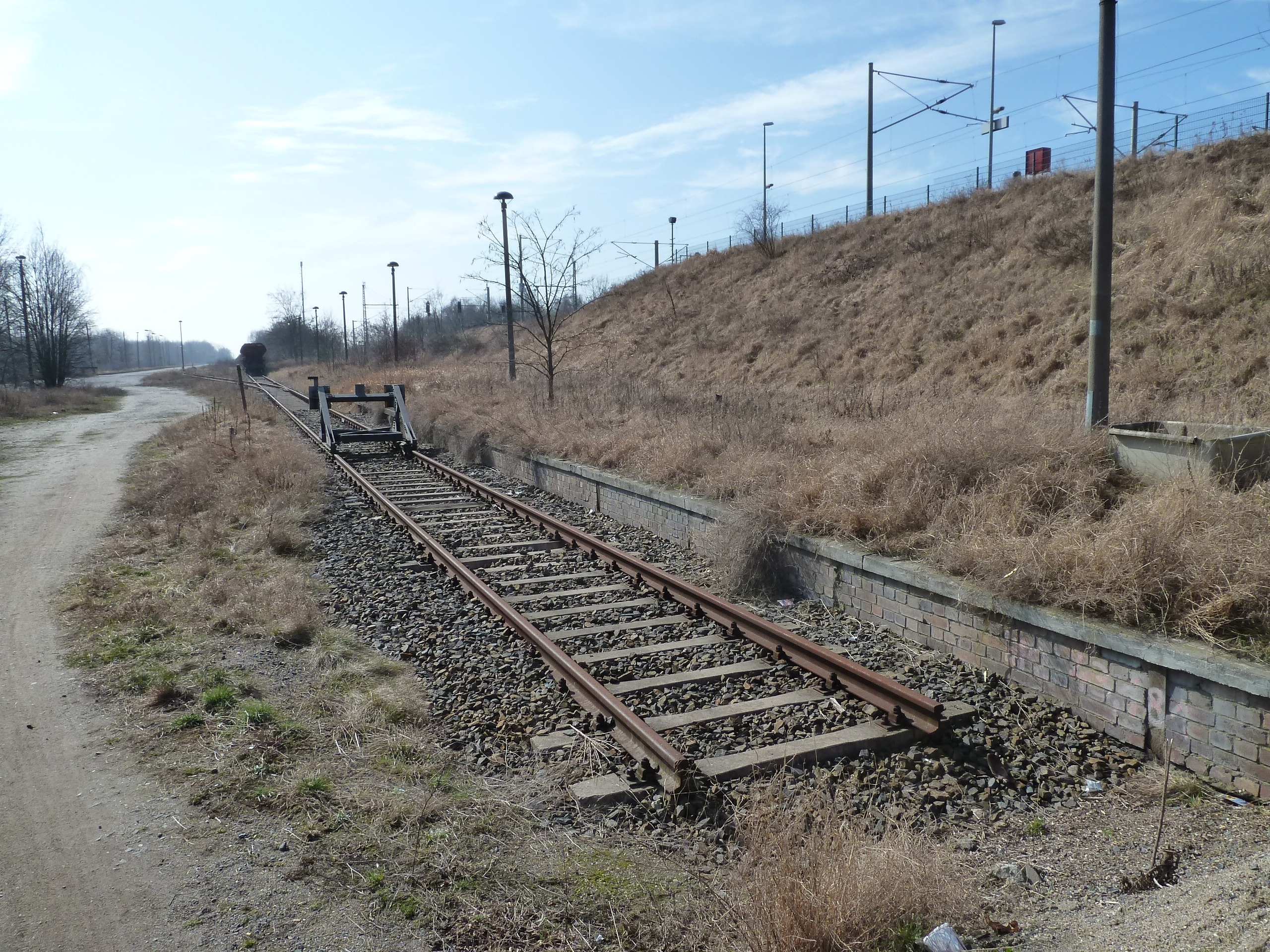 Bahnhof Teltow, Güterbahnhof östlich der Gleise der Anhalter Bahn